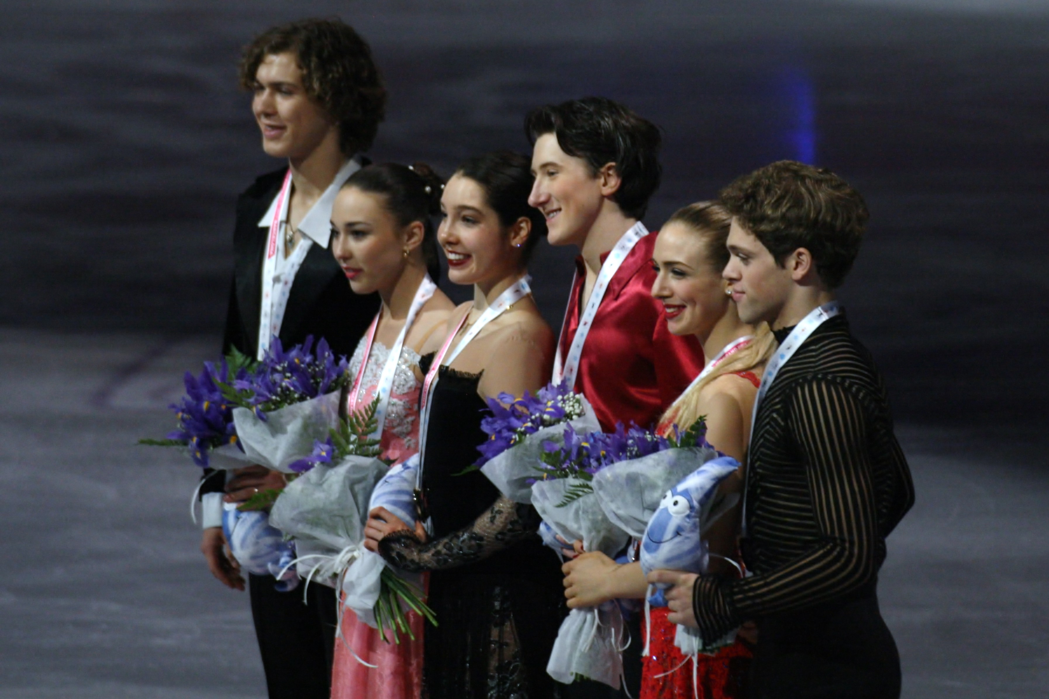 Церемония награждения на финале Гран-при по фигурному катанию среди юниоров 2015-2016.